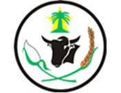 Escudo de Villanueva